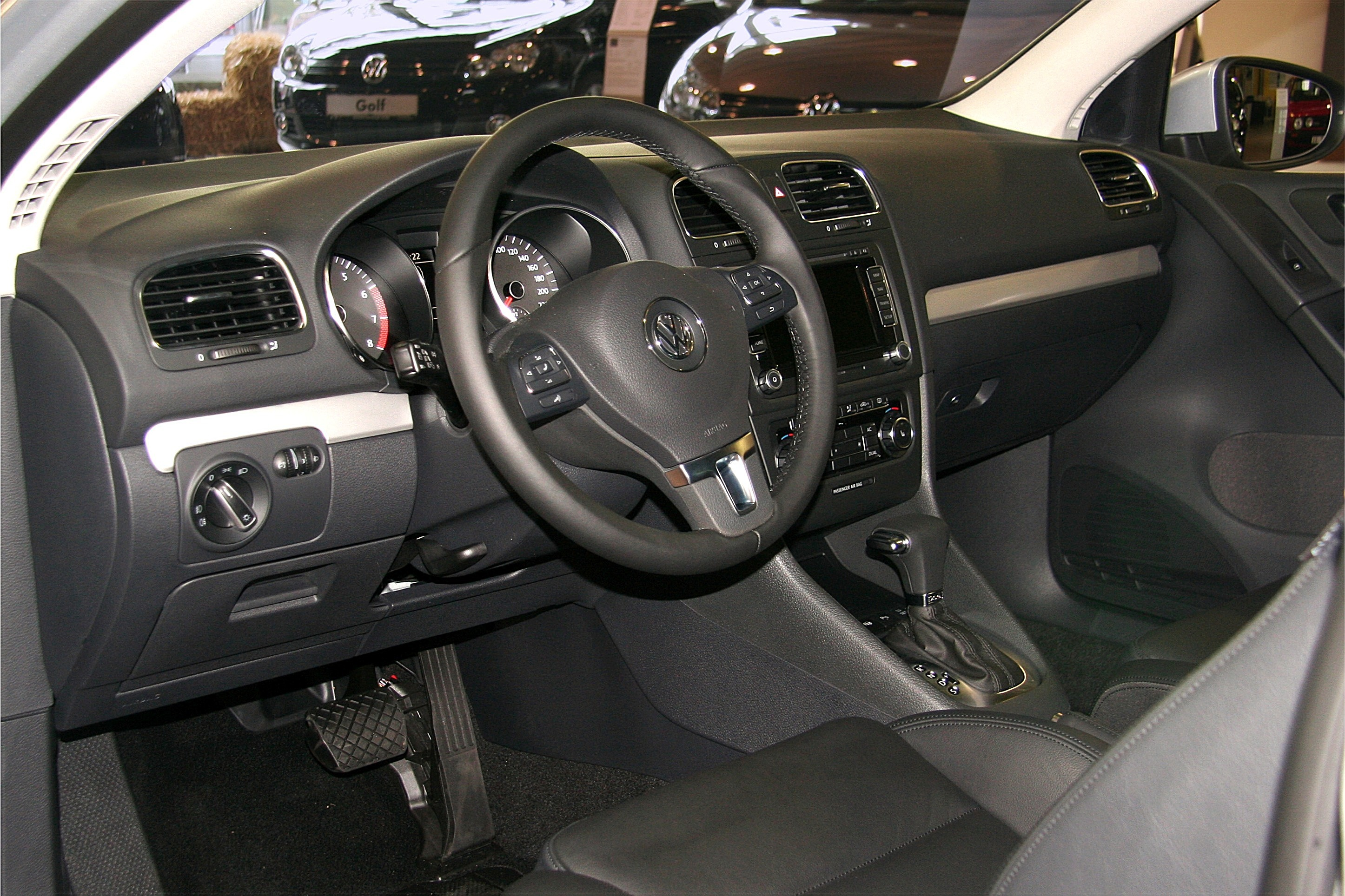 Cockpit des VW Golf VI TSI mit 7-Gang-DSG